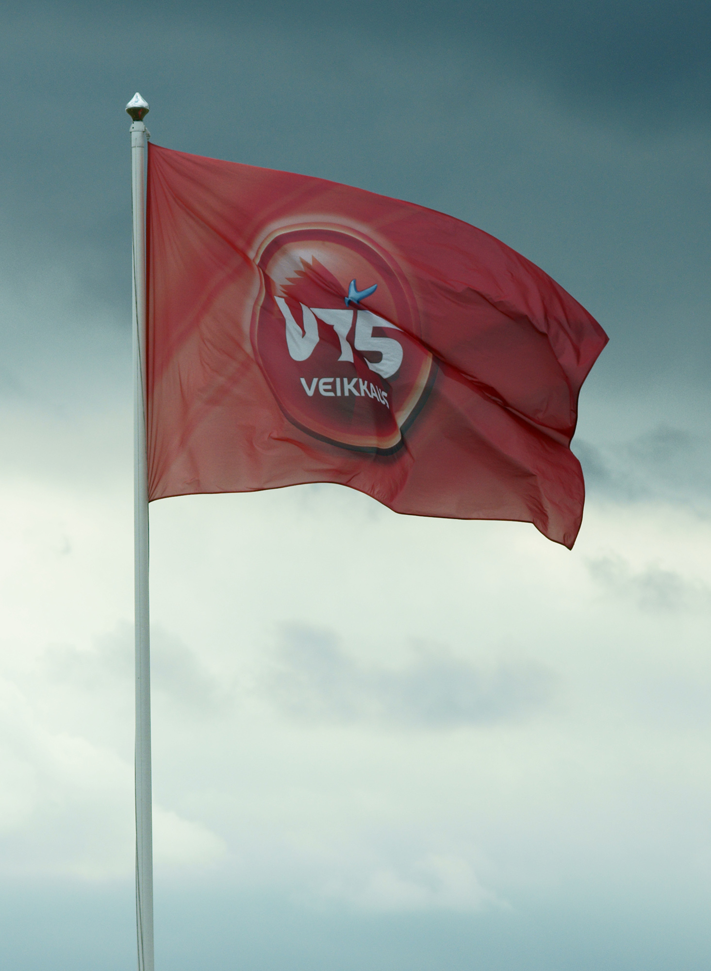 V75-lippu Porin raviradalla.